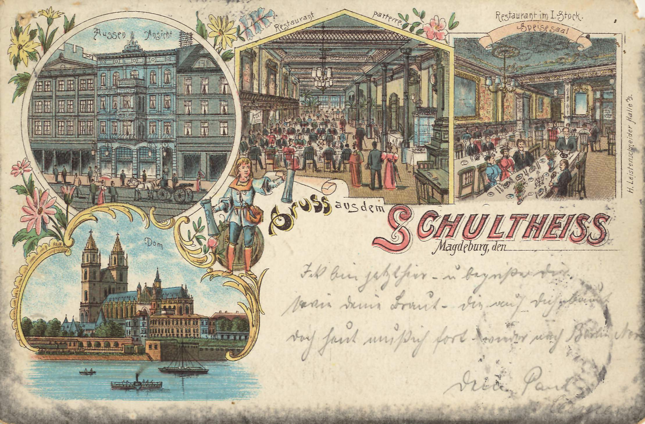 Schultheißbrauerei (Außenansicht, Restaurant Parterre und im I. Stock, Speisesaal); Dom